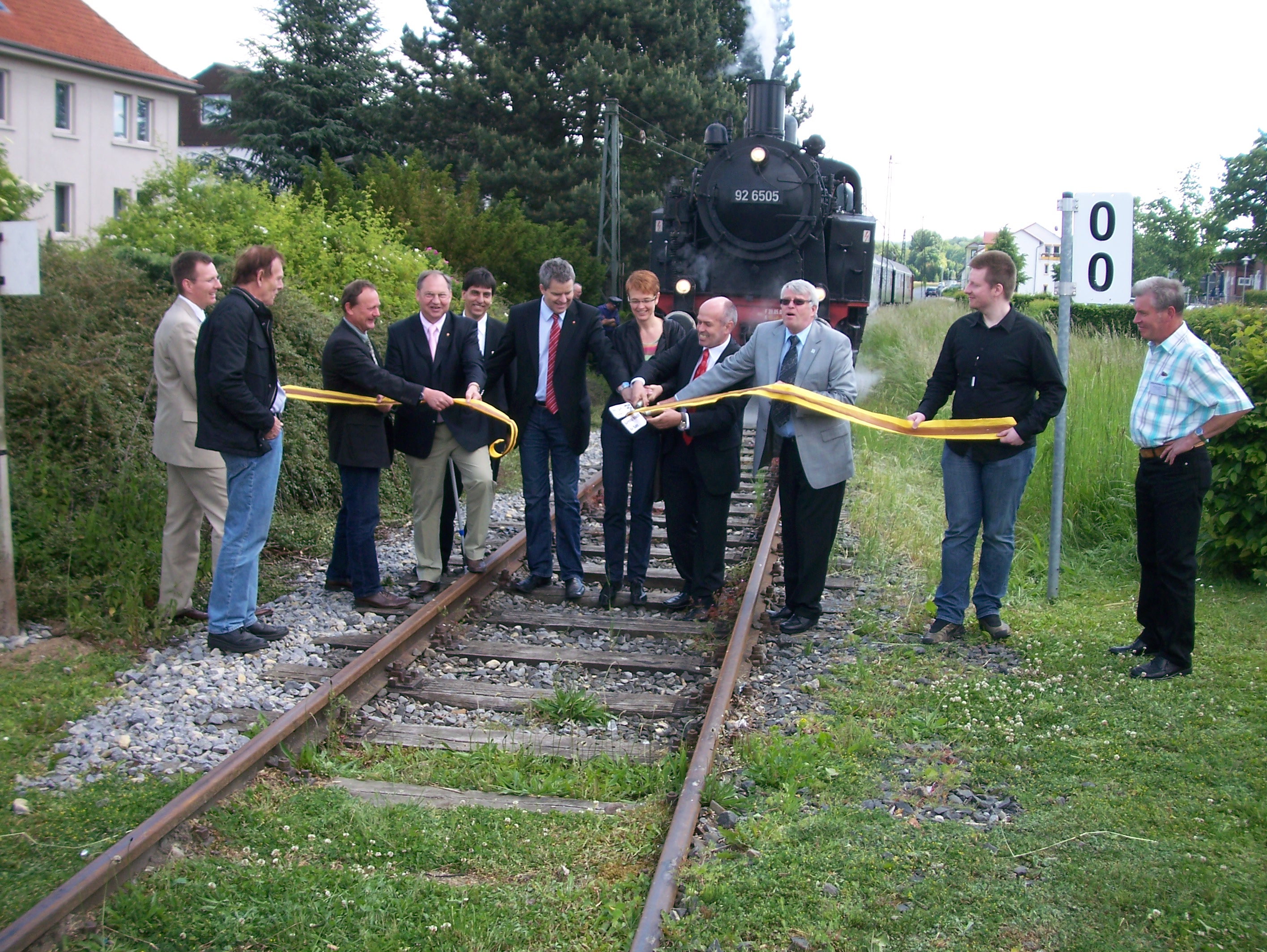 Banddurchschneidung zu eröffung der musealen Nutzung der Begatalbahn in Barntrup. Auf der Schere steht: "Barntrup braucht die Bahn"